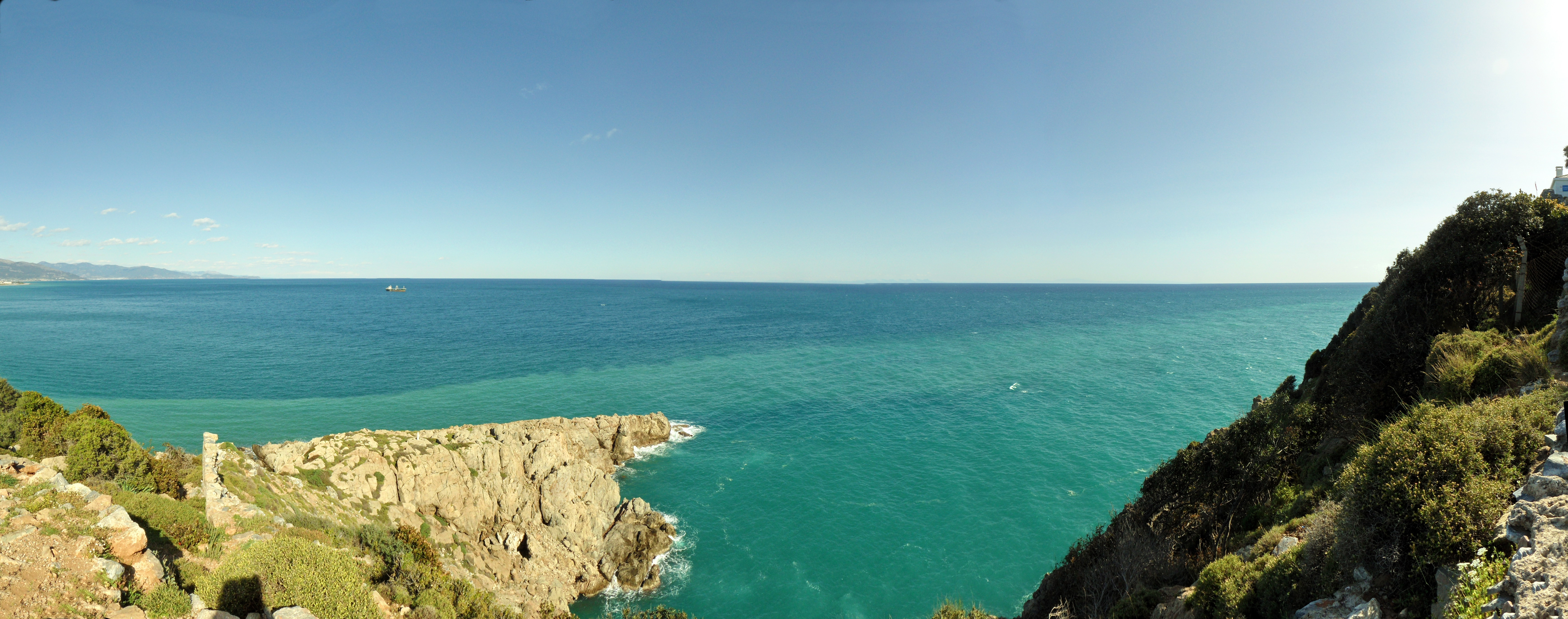 Anamur Burnu